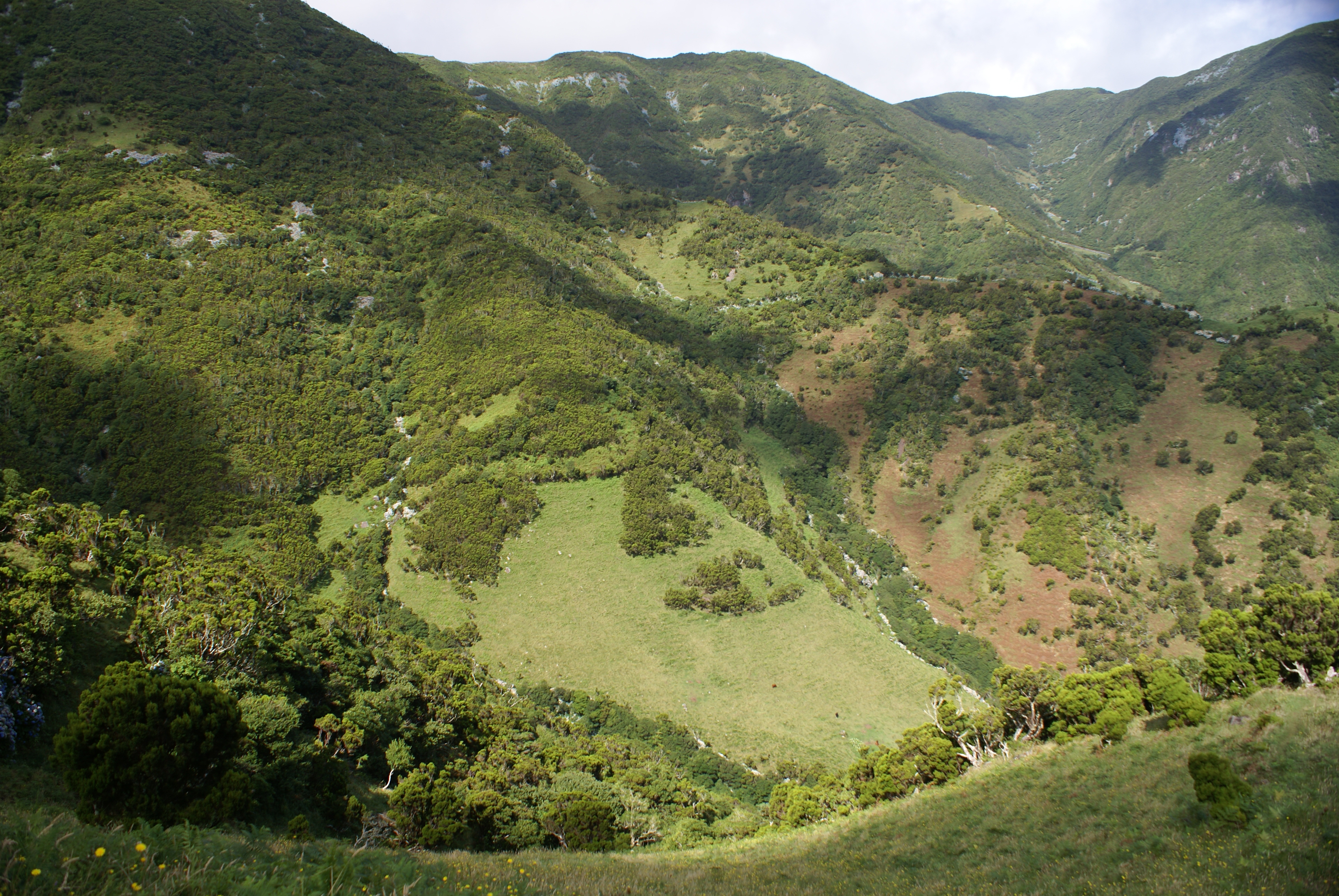 Caminho pedestre da Serra do Topo para a Fajã de Santo Cristo, vista 4, Calheta, ilha de São Jorge, Açores